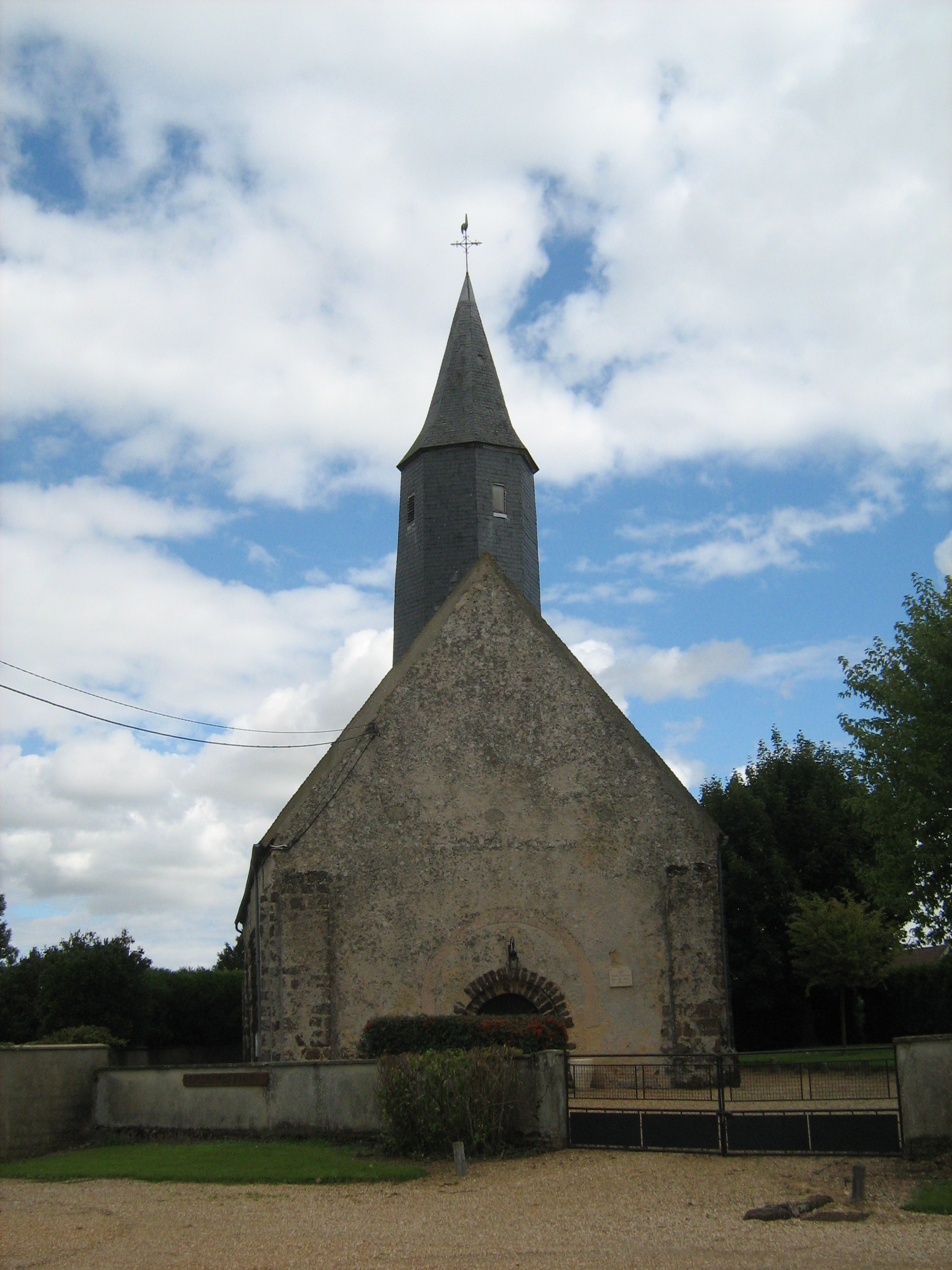 Ancienne église de Saint-Jean des Murgers, aujourd'hui salle des fêtes.